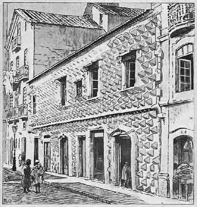 Esta imagem (em domínio público por morte do autor há mais de 75 anos) faz parte de um conjunto de 100 aguarelas e gravuras criadas em 1910-1920 e publicadas no livro Lisboa Velha (Afonso Lopes Vieira (prefácio). Anuário Comercial: Lisboa, 1925).